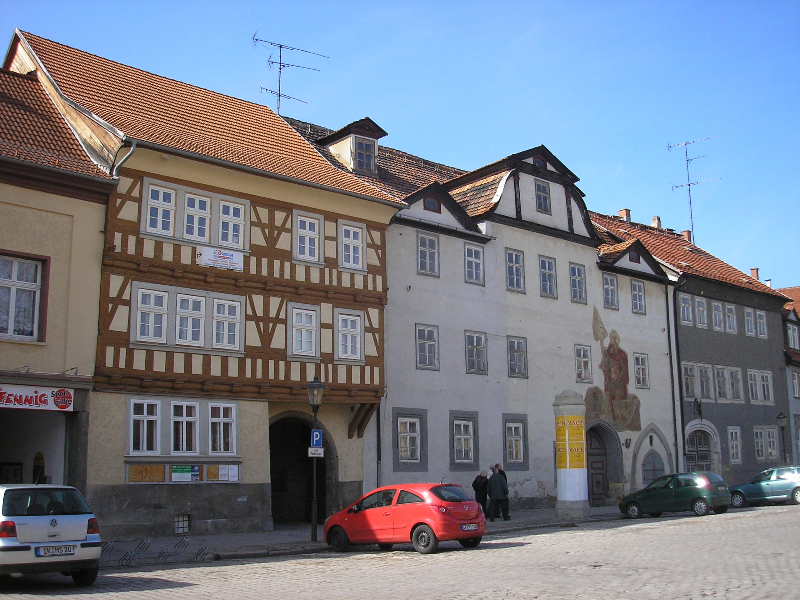 Das Haus zum großen Christoph am Ried in Arnstadt (Thüringen).